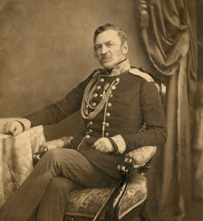 князь Илларион Илларионович Васильчиков (1805-1862)